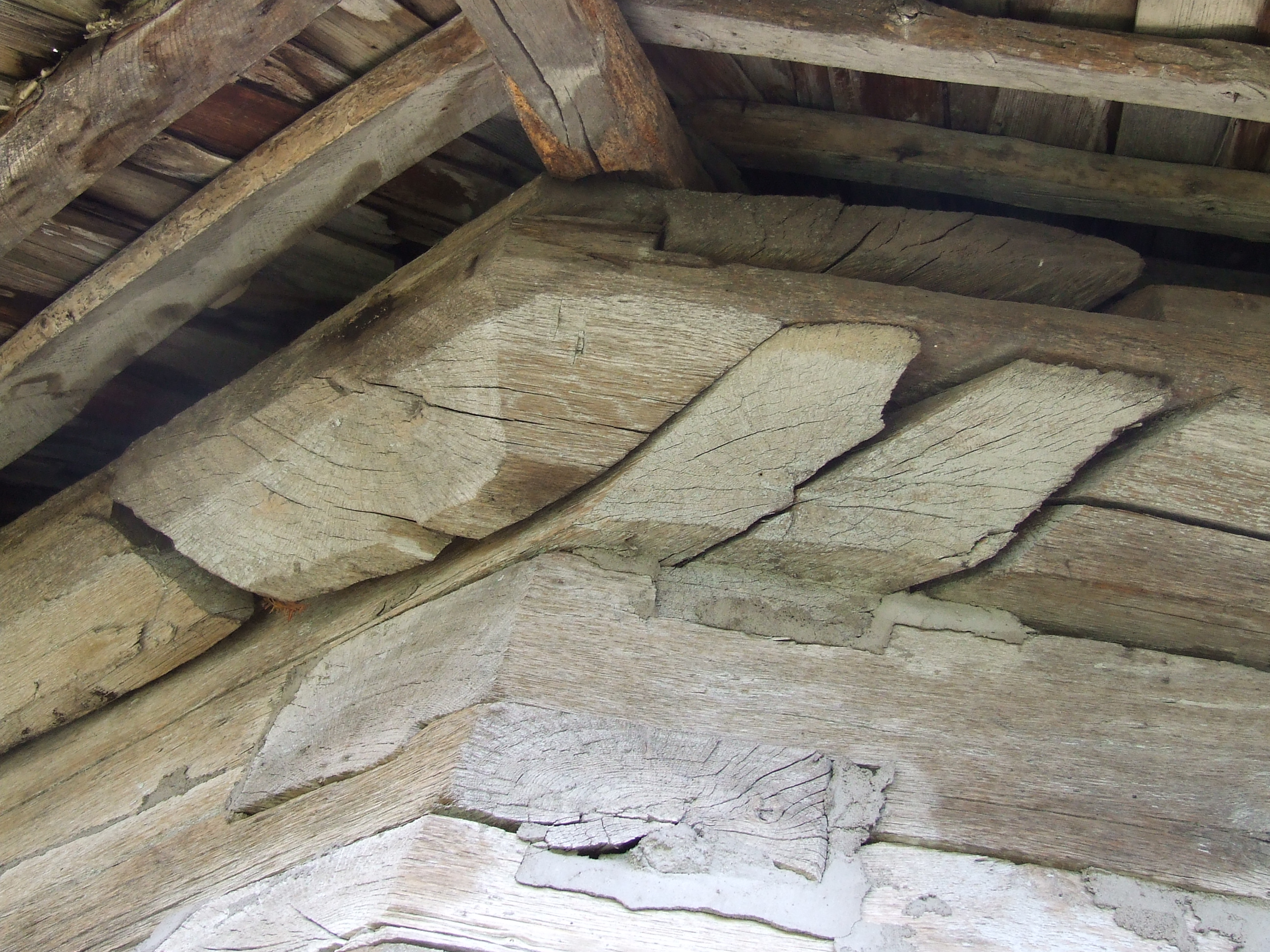 Îmbinare III, Biserica de lemn Sf Arhangheli din Letca, jud. Sălaj